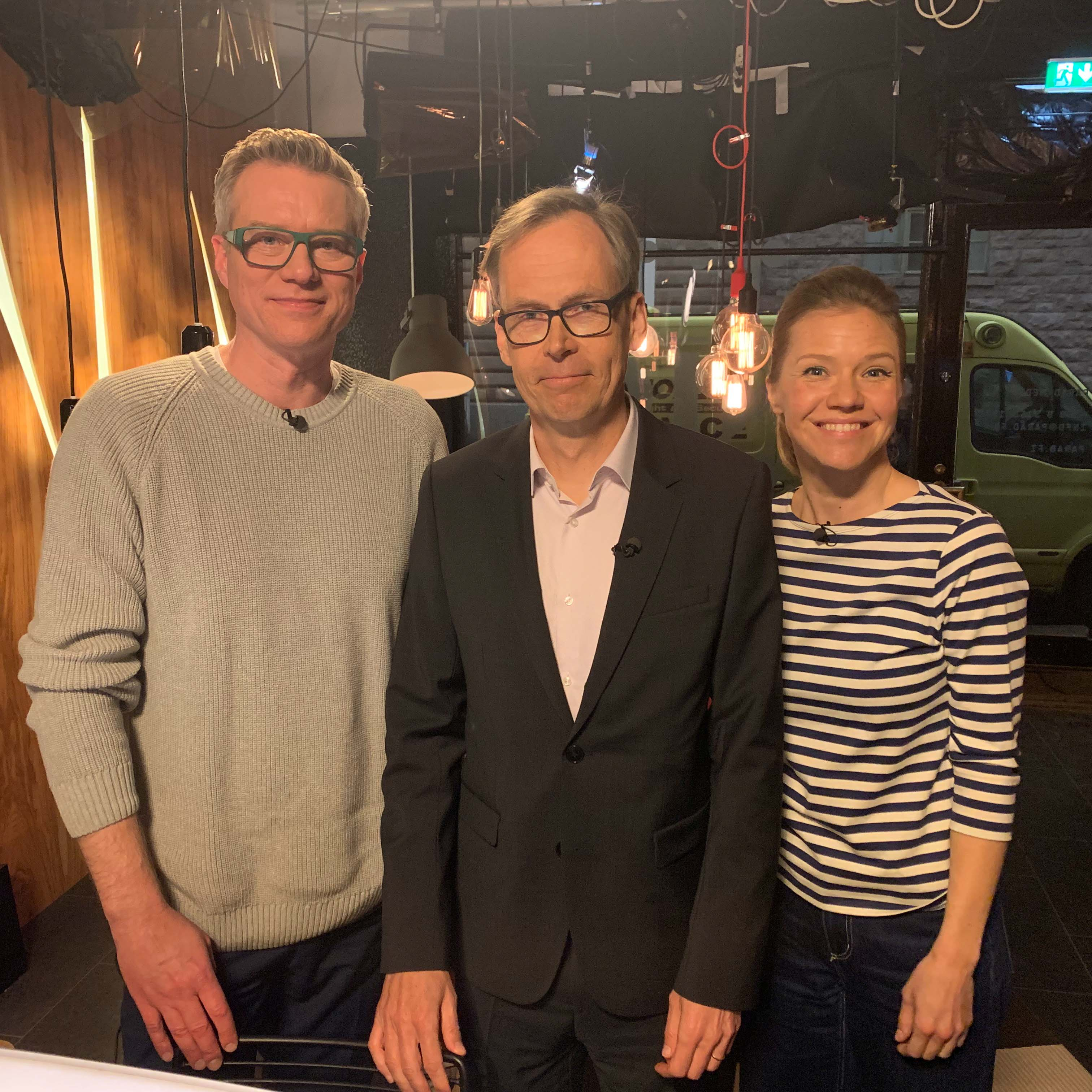 Group portrait after the recording of the program being broadcast 15.4.2019